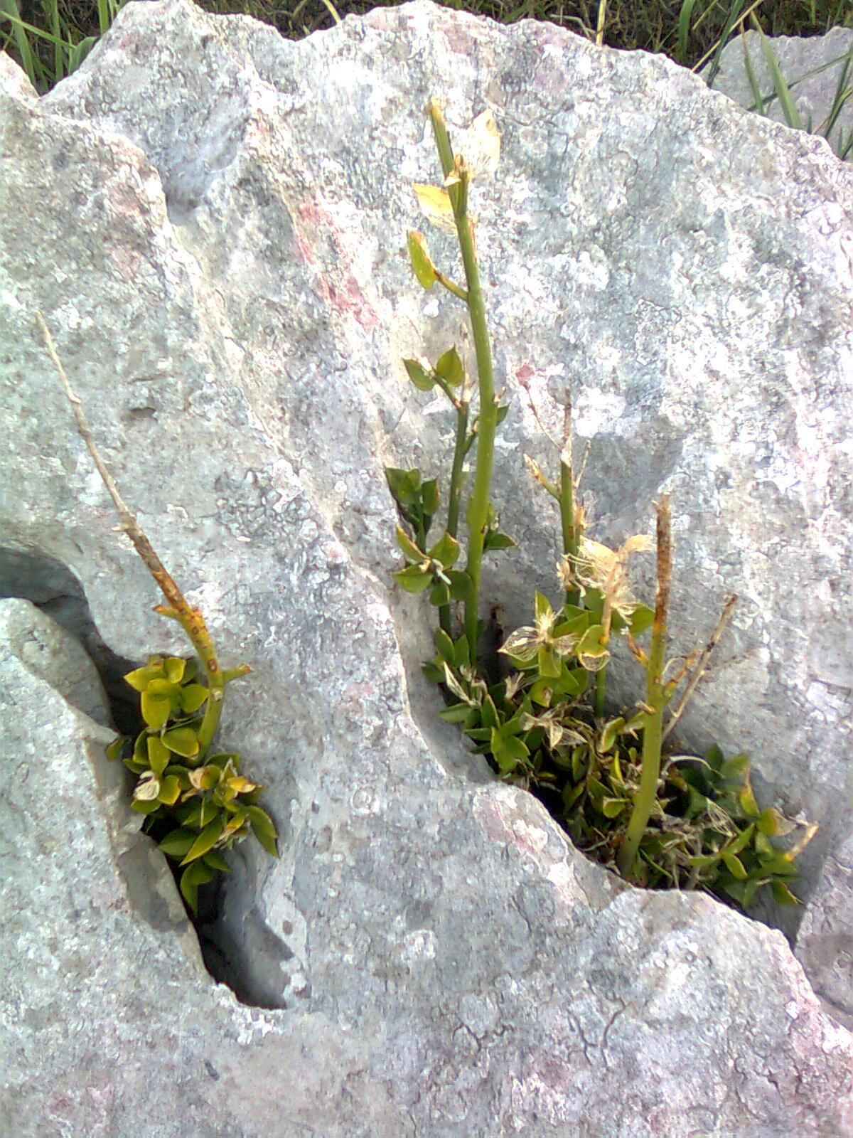 Rusco (Ruscus aculeatus) creciendo entre las grietas de una roca caliza, de la formación kárstica costera en la localidad de Islares, en el municipio de Castro Urdiales, Cantabria